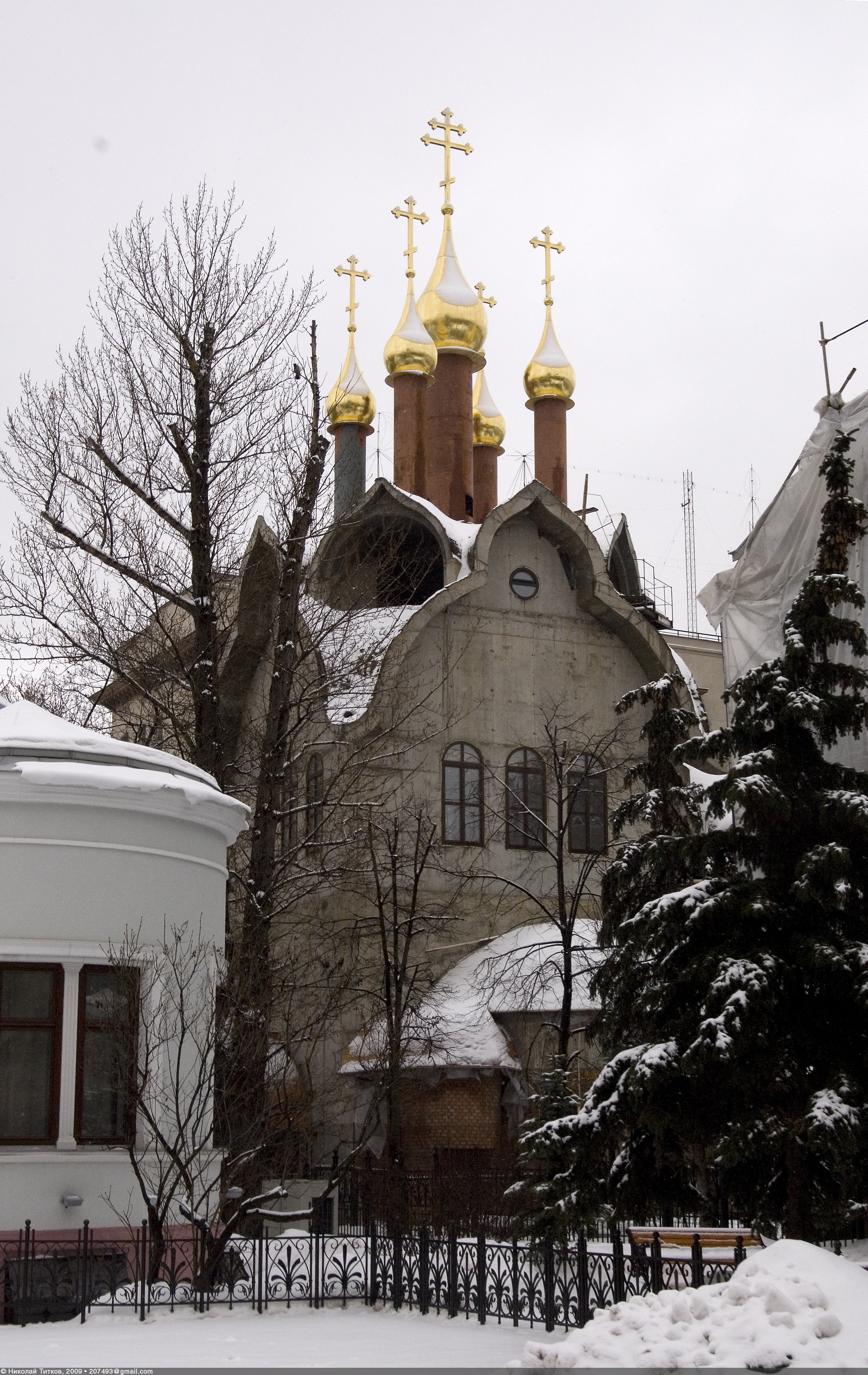 Москва, Проспект Мира, 22—24. Строящаяся церковь Собора Дивеевских святых при московском подворье Троицкого Серафимо-Дивеевского монастыря